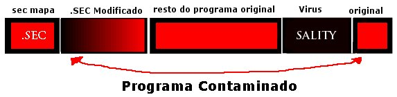 Arquivo contaminado com virus sality